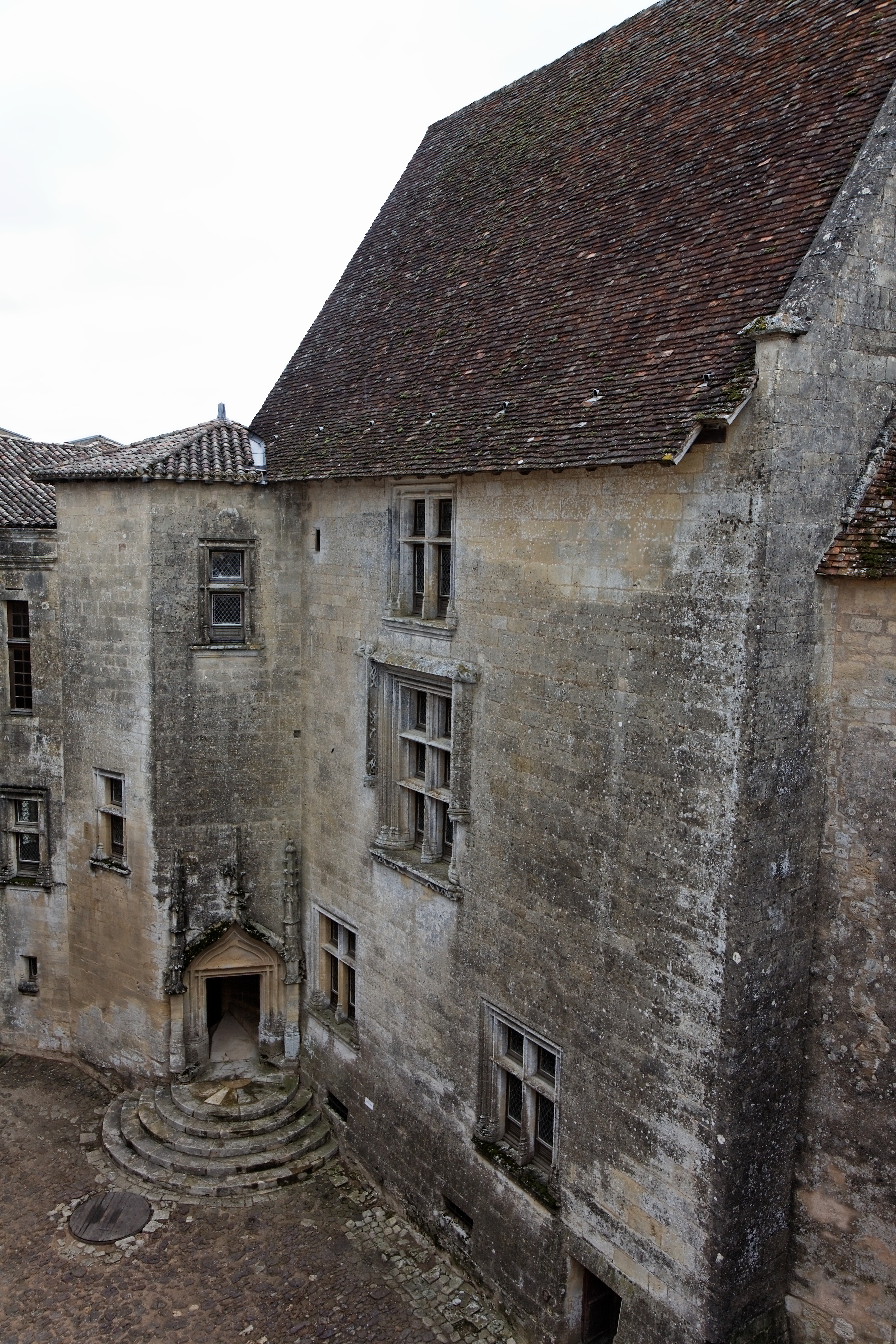 Vue du château de Biron.